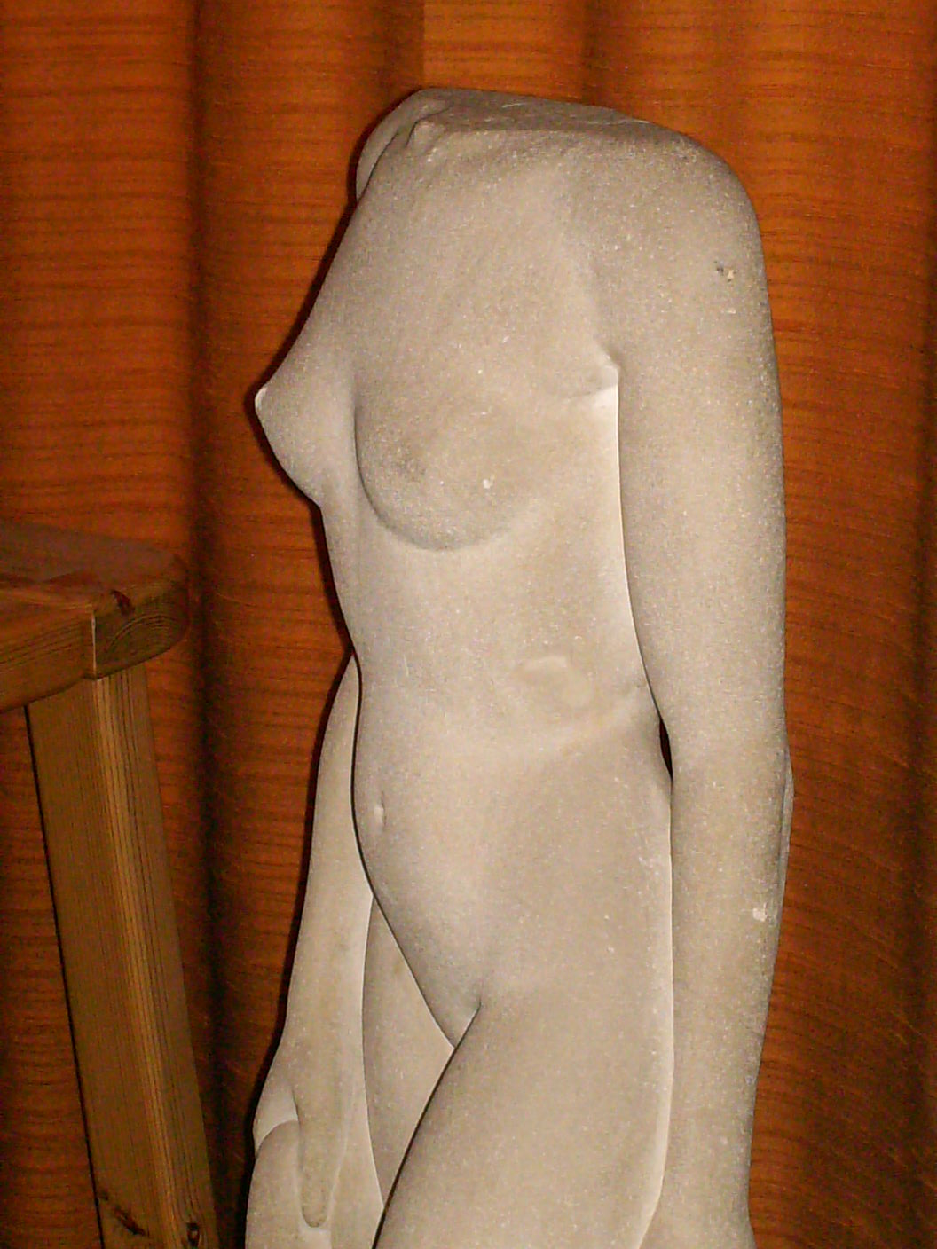 Torce, Mau Xhrouet, ca. 1940, pierre reconstituée